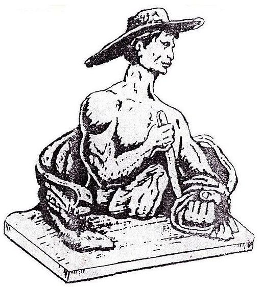 Fernando terrones Ascencio Heroe Nacional